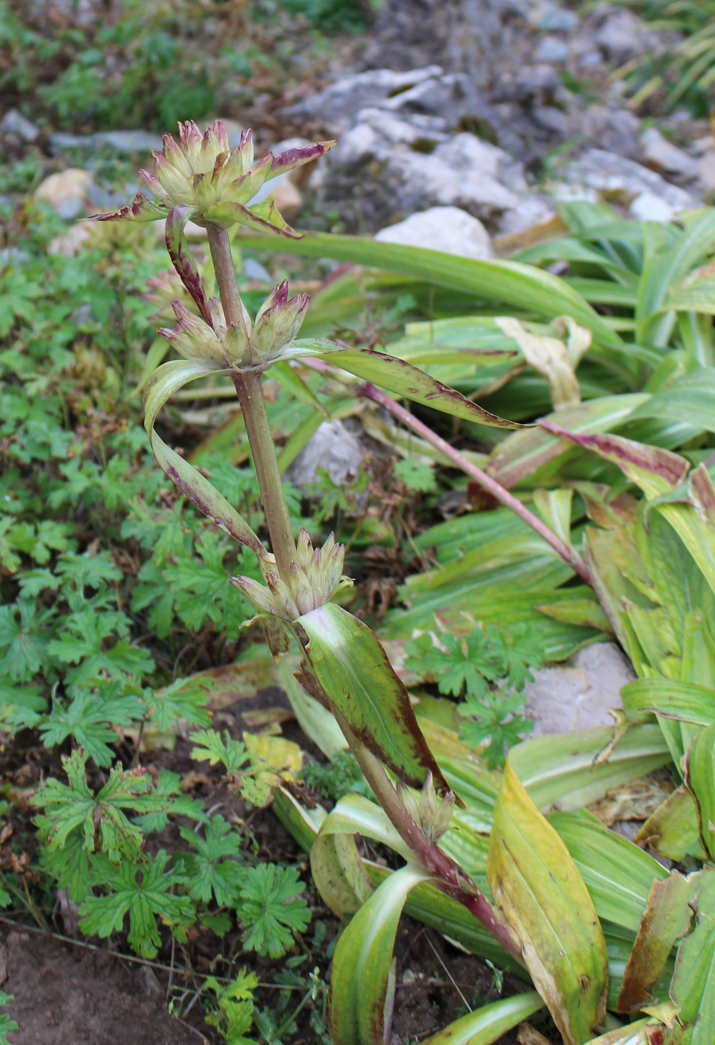 Gentiana crassicaulis im Botanischen Alpengarten Viote